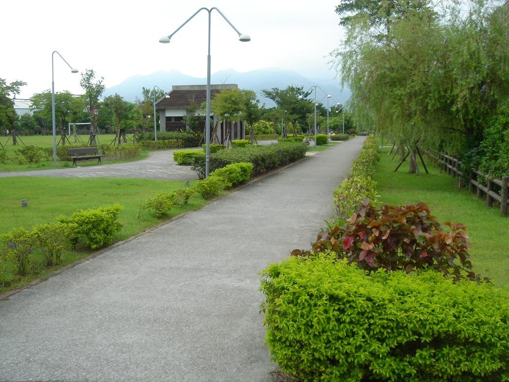 台北縣三重市集賢路的集賢環保公園園路盡頭可見陽明山。